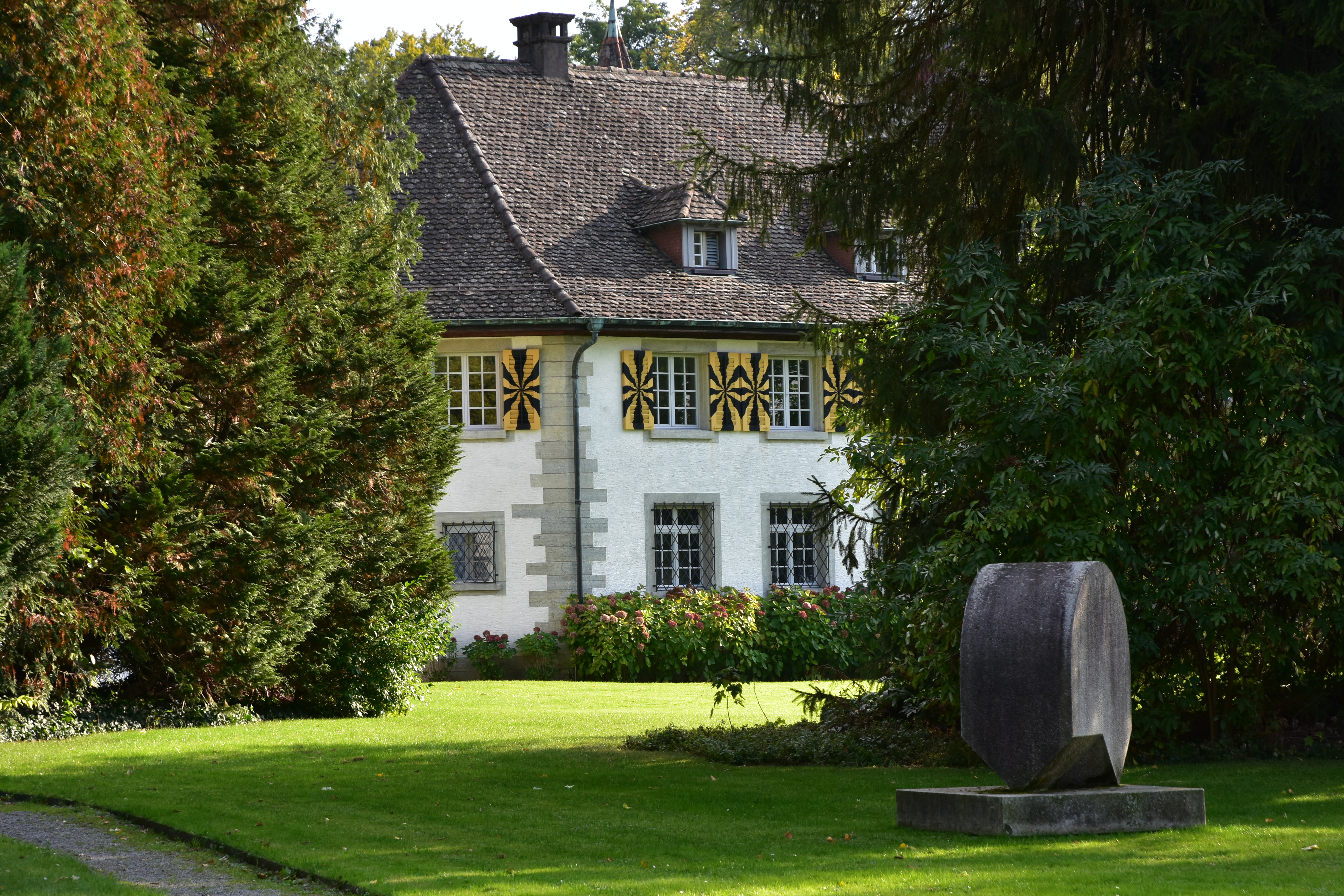 Schloss Au on Au peninsula in Au on Zürichsee lake shore in Switzerland